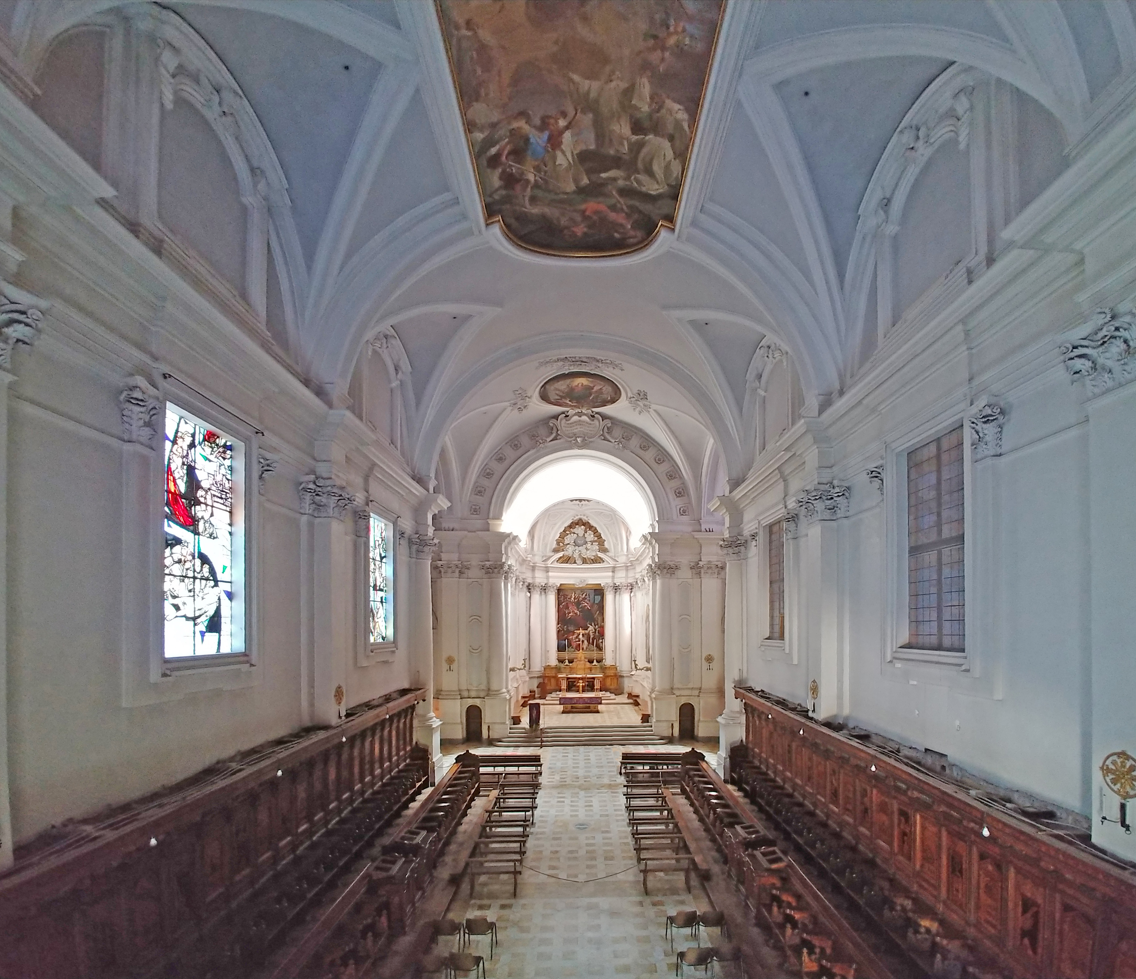 Interno dalla cantoria.